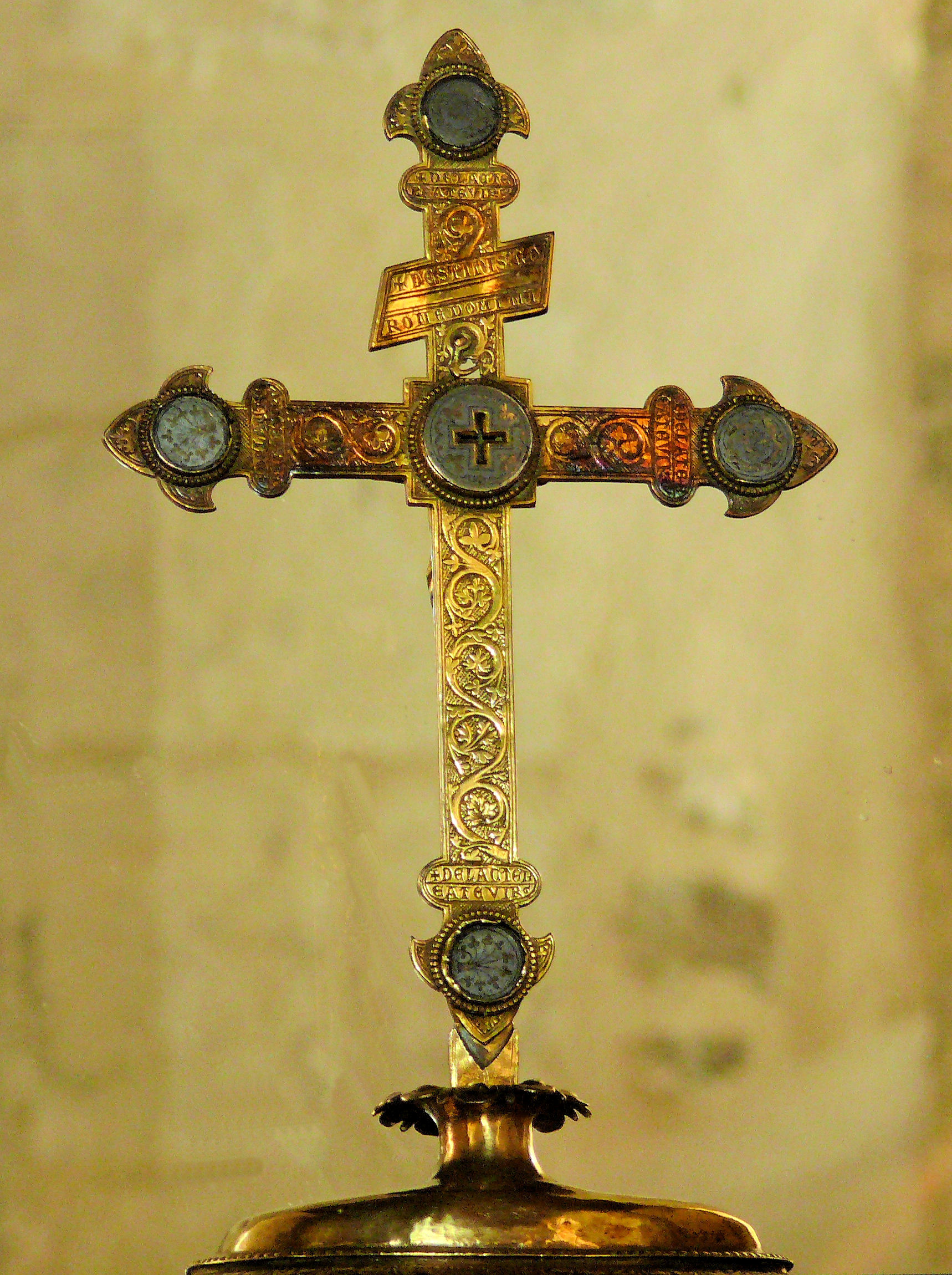 Orval (Cher) - Eglise Saint-Hilaire - Croix-reliquaire de Saint-Louis